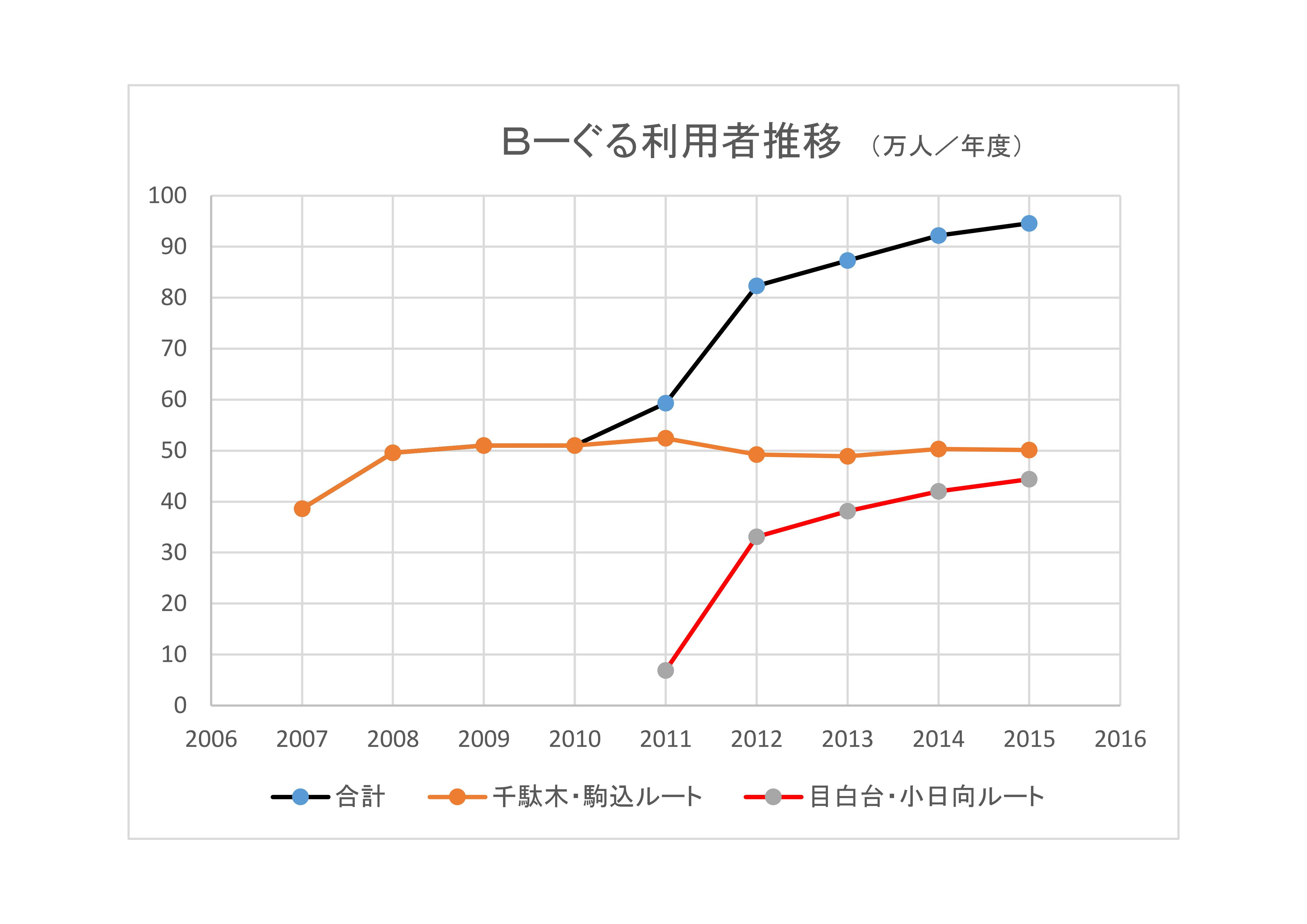 B-ぐる利用者推移